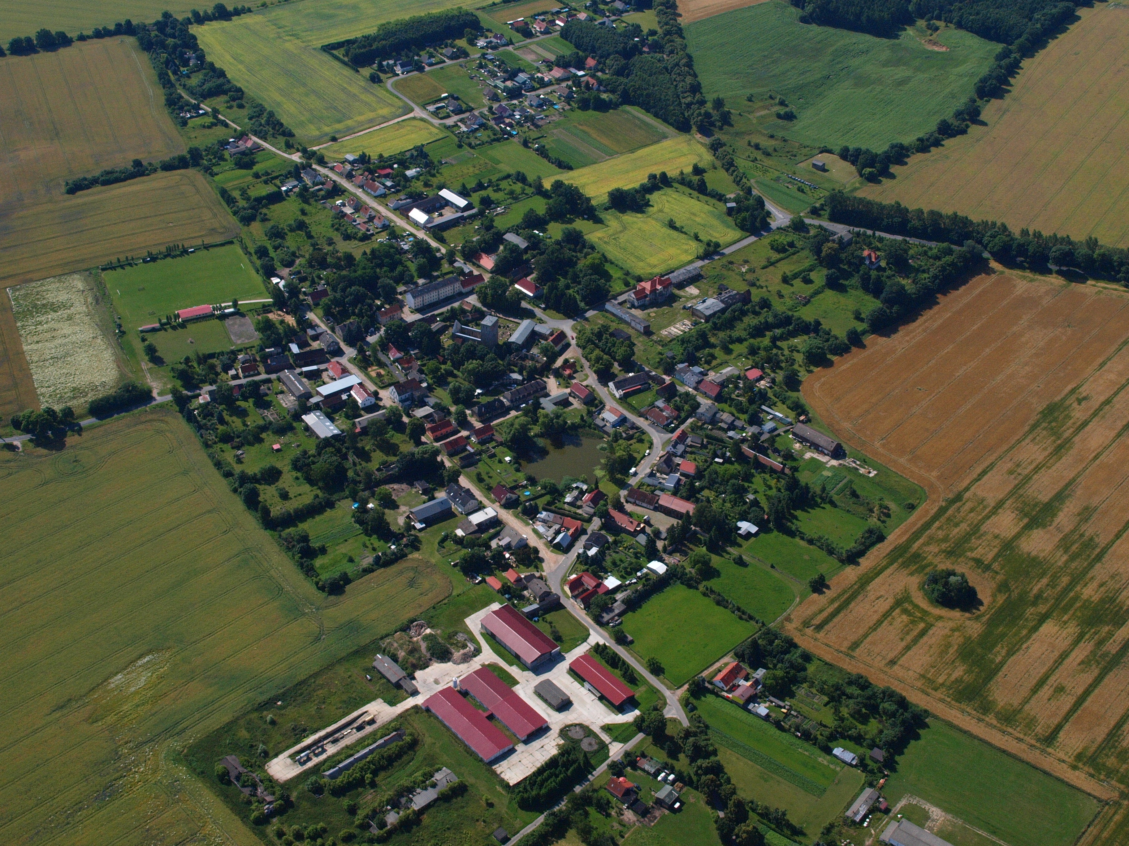 Beiersdorf-Freudenberg aus nördlicher Sicht